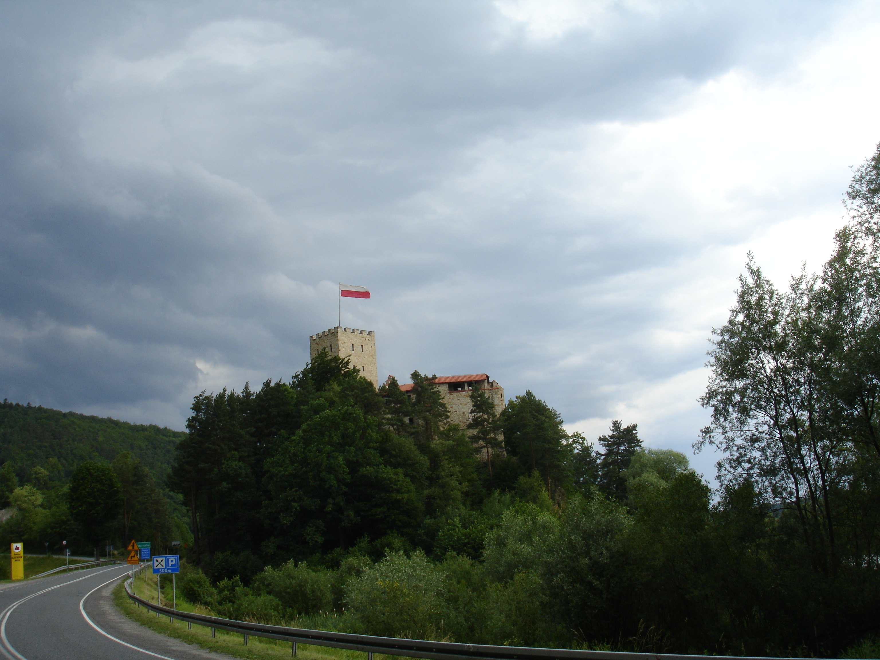 castle in Tropsztyn (Wytrzyszczka)